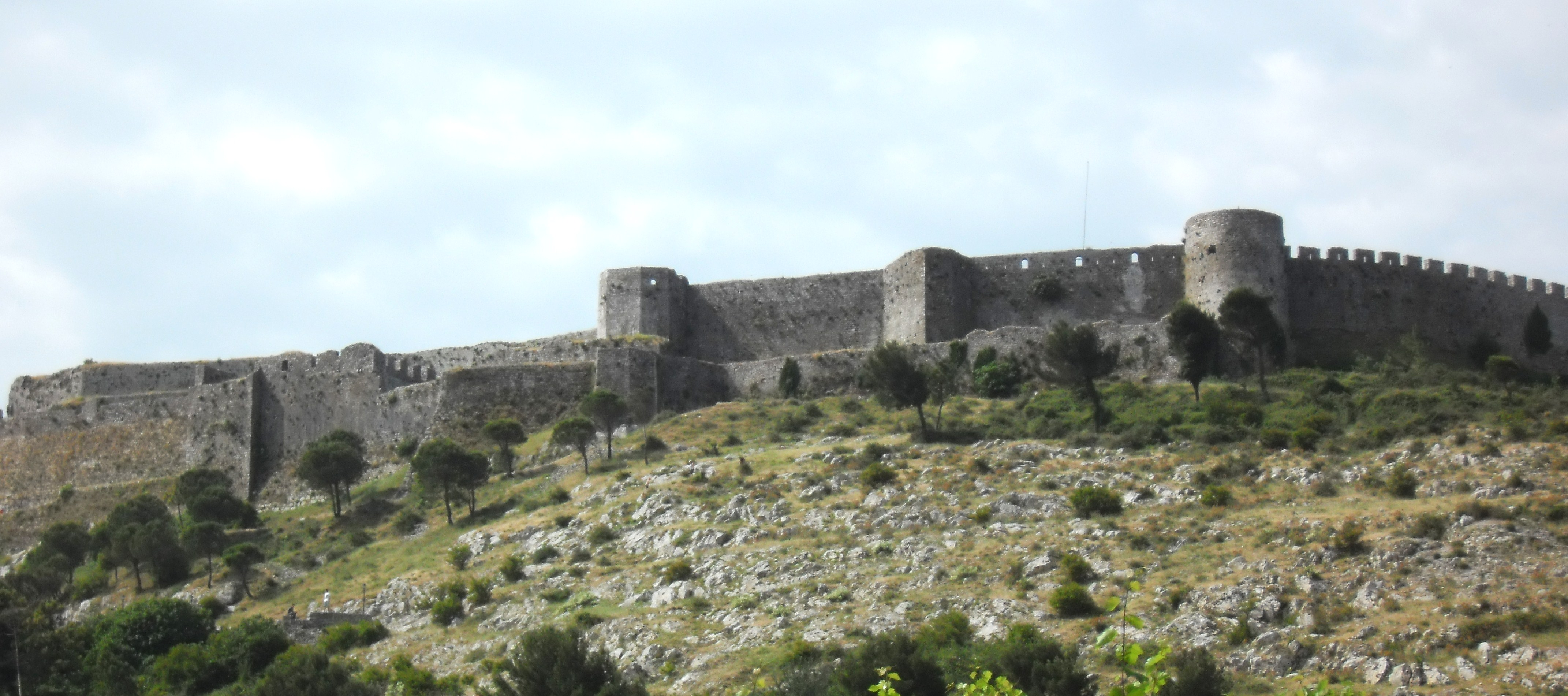 Burg Rozafa bei Shkoder